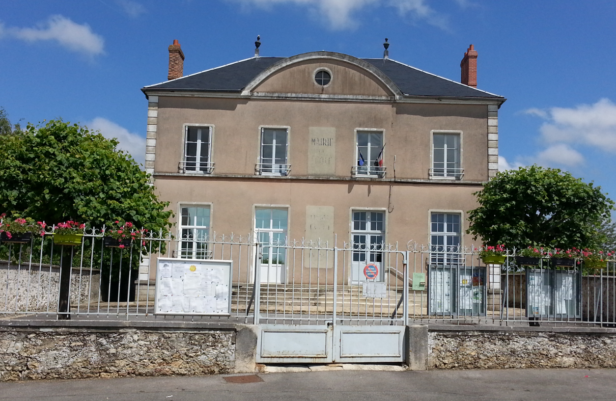 Mairie de Coulommes